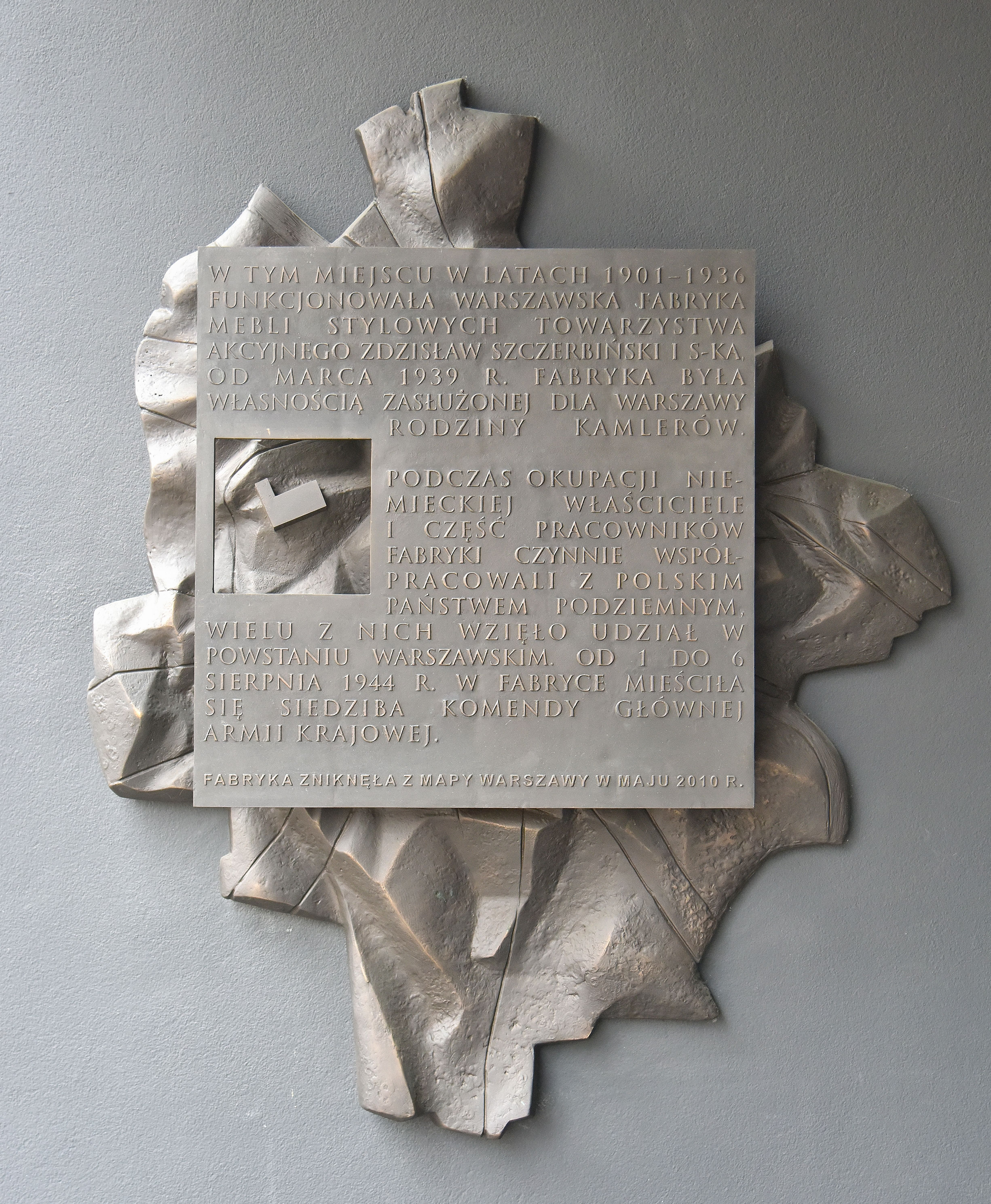 Tablica upamiętniająca dawną fabryką Kamlera na budynku przy ul. Dzielnej 72